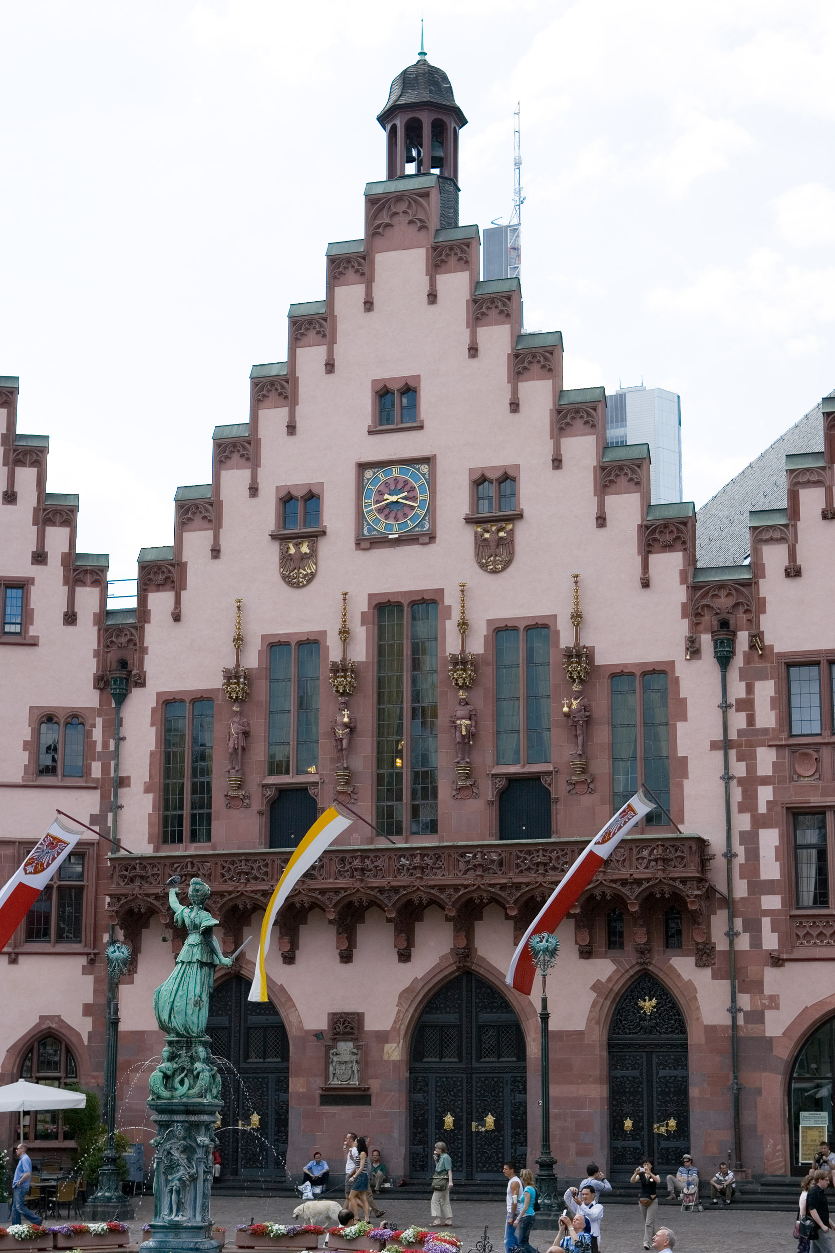 Haus zum Römer in der Frankfurter Altstadt, vom Samstagsberg aus gesehen. Selber fotografiert im Juni 2007, GFDL-Lizenz.